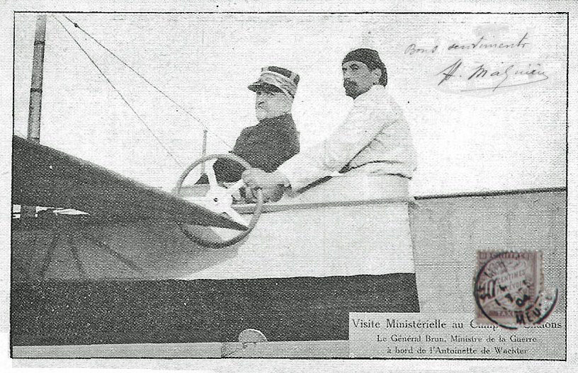 Wachter fait voler le ministre de la guerre Brun sur son avion Antoinette.